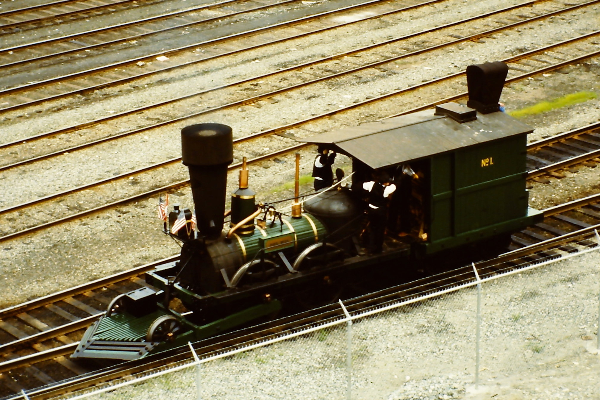 Dampflokomotive „John Bull“ (Replikat) auf der SteamExpo 86